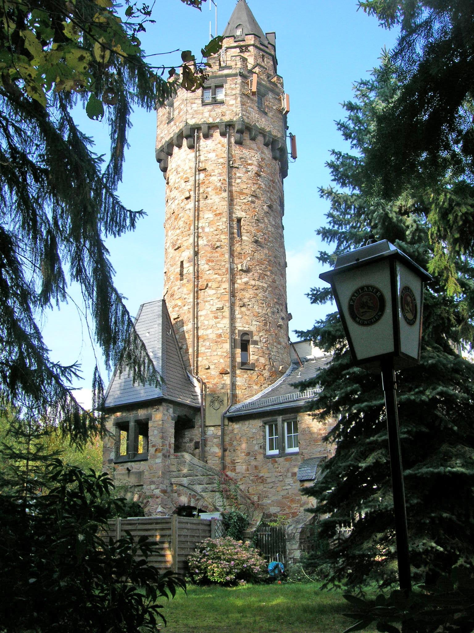 Schläferskopf im Taunus bei Wiesbaden